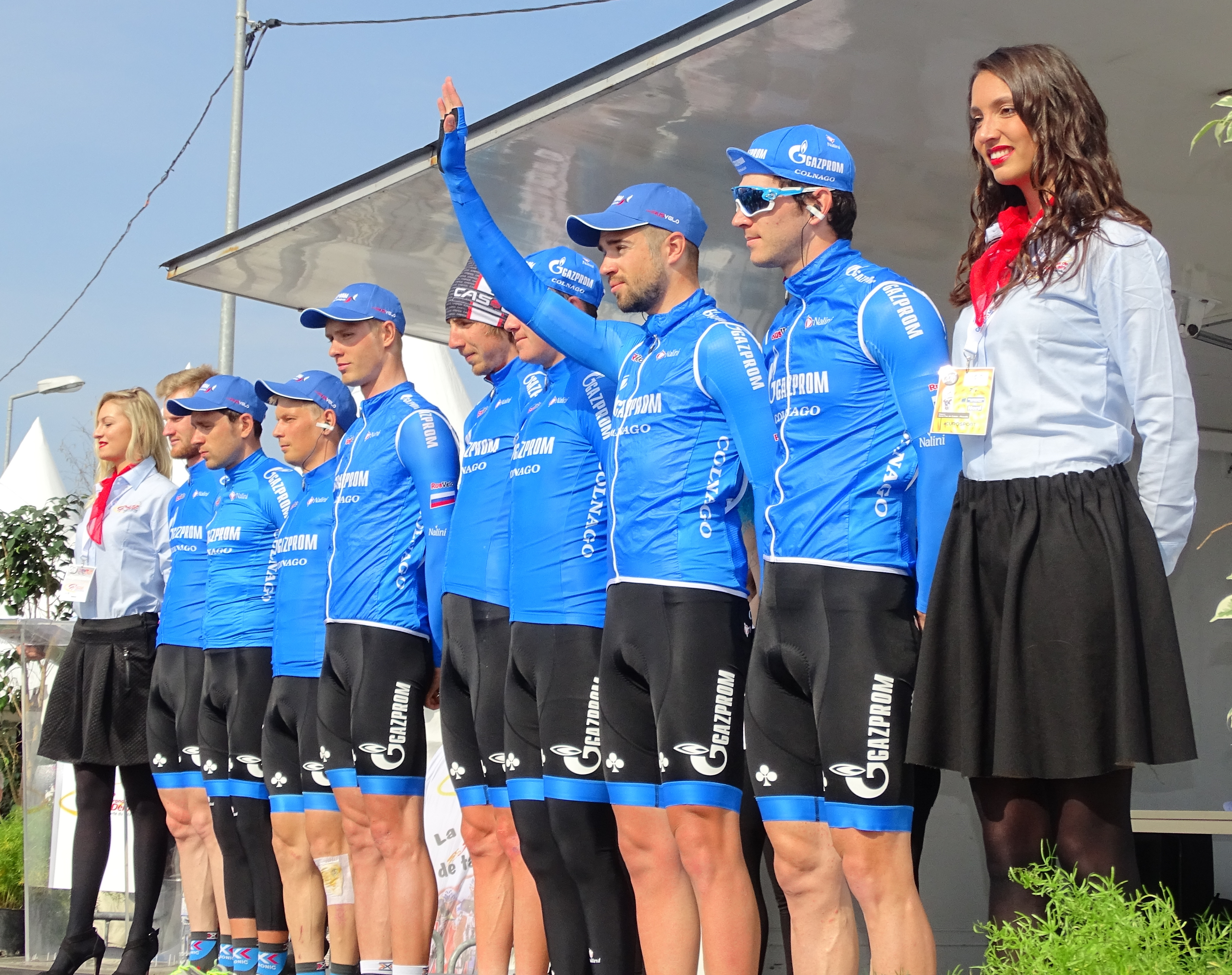 Reportage réalisé le jeudi 14 avril à l'occasion du départ et de l'arrivée du Grand Prix de Denain 2016 à Denain, Nord, Nord-Pas-de-Calais-Picardie, France.